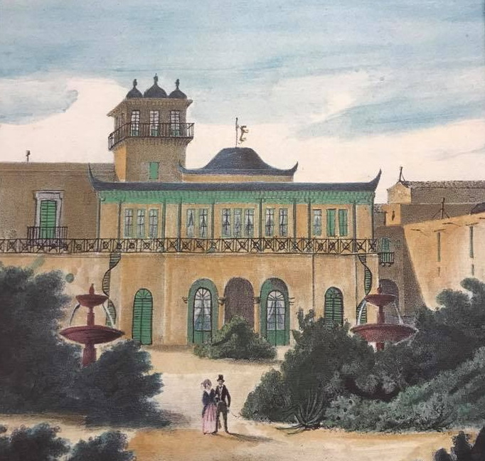 Villa Butera